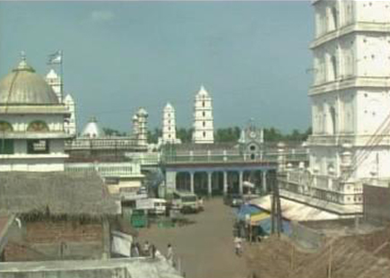 nakur tharka nagapattanam